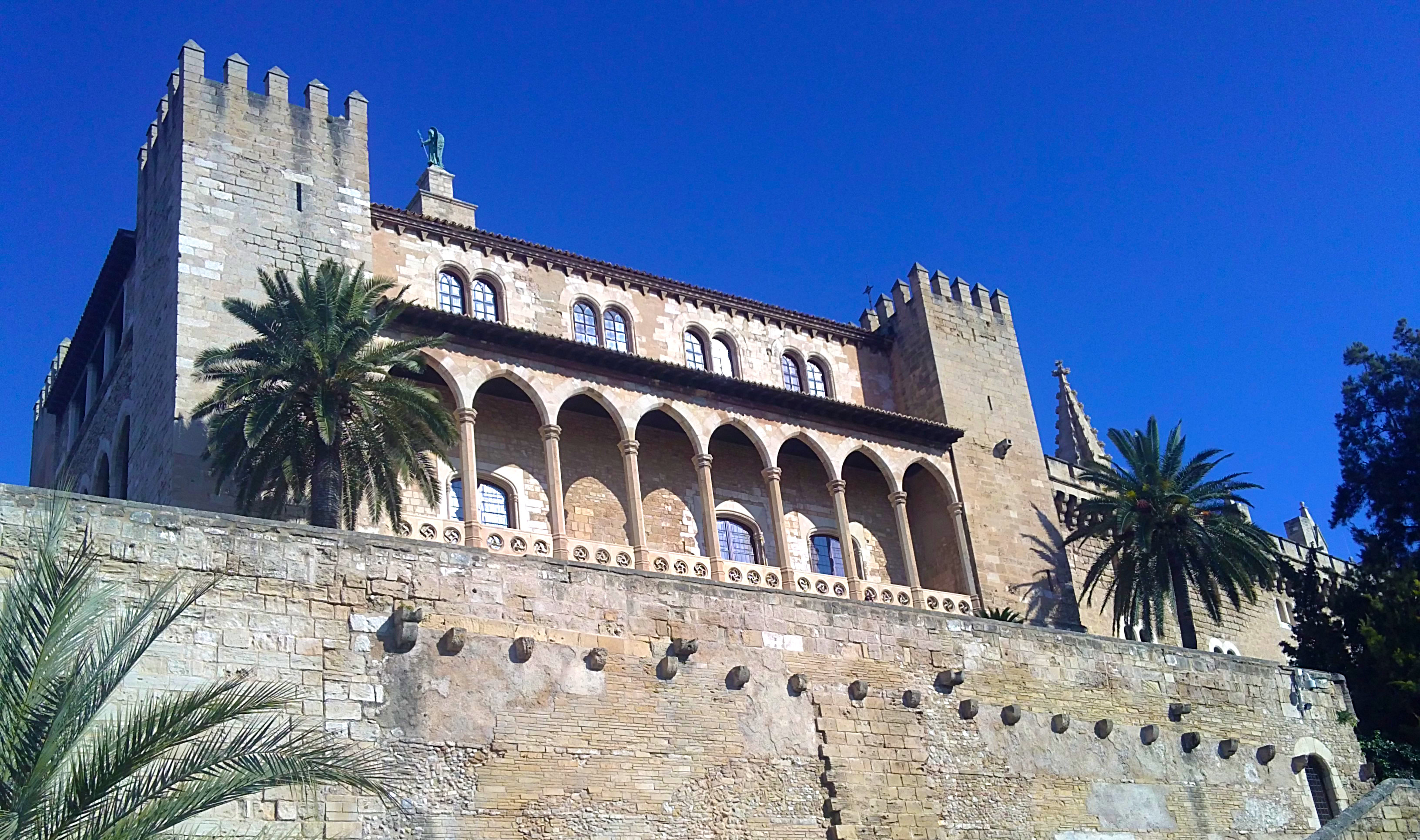 Palacio real de Palma de Mallorca